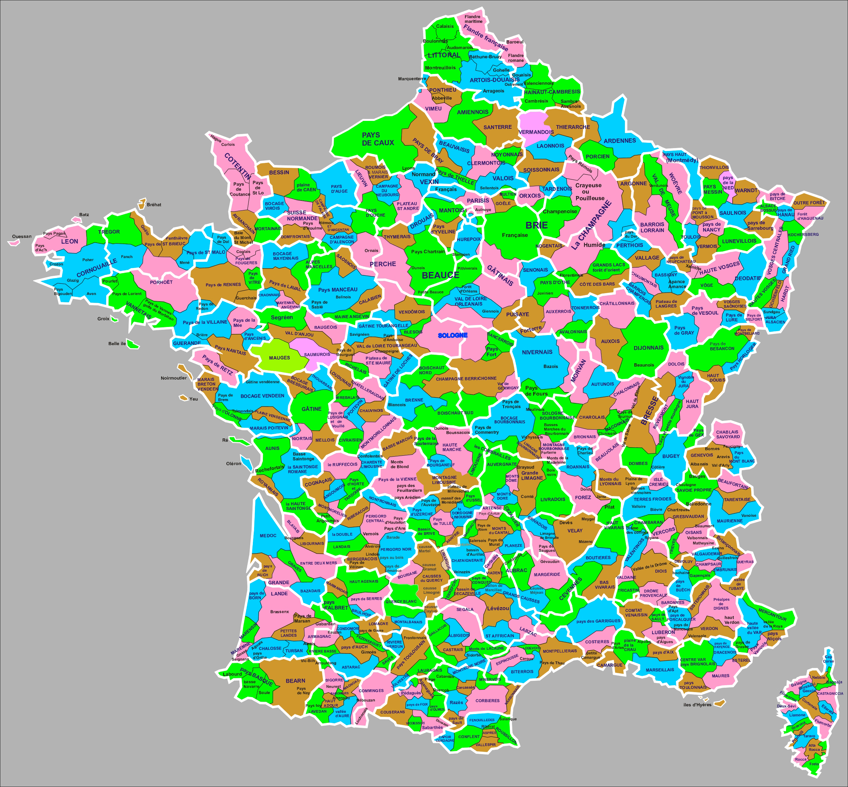 carte des régions naturelles françaises